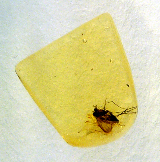 Moskito in amber